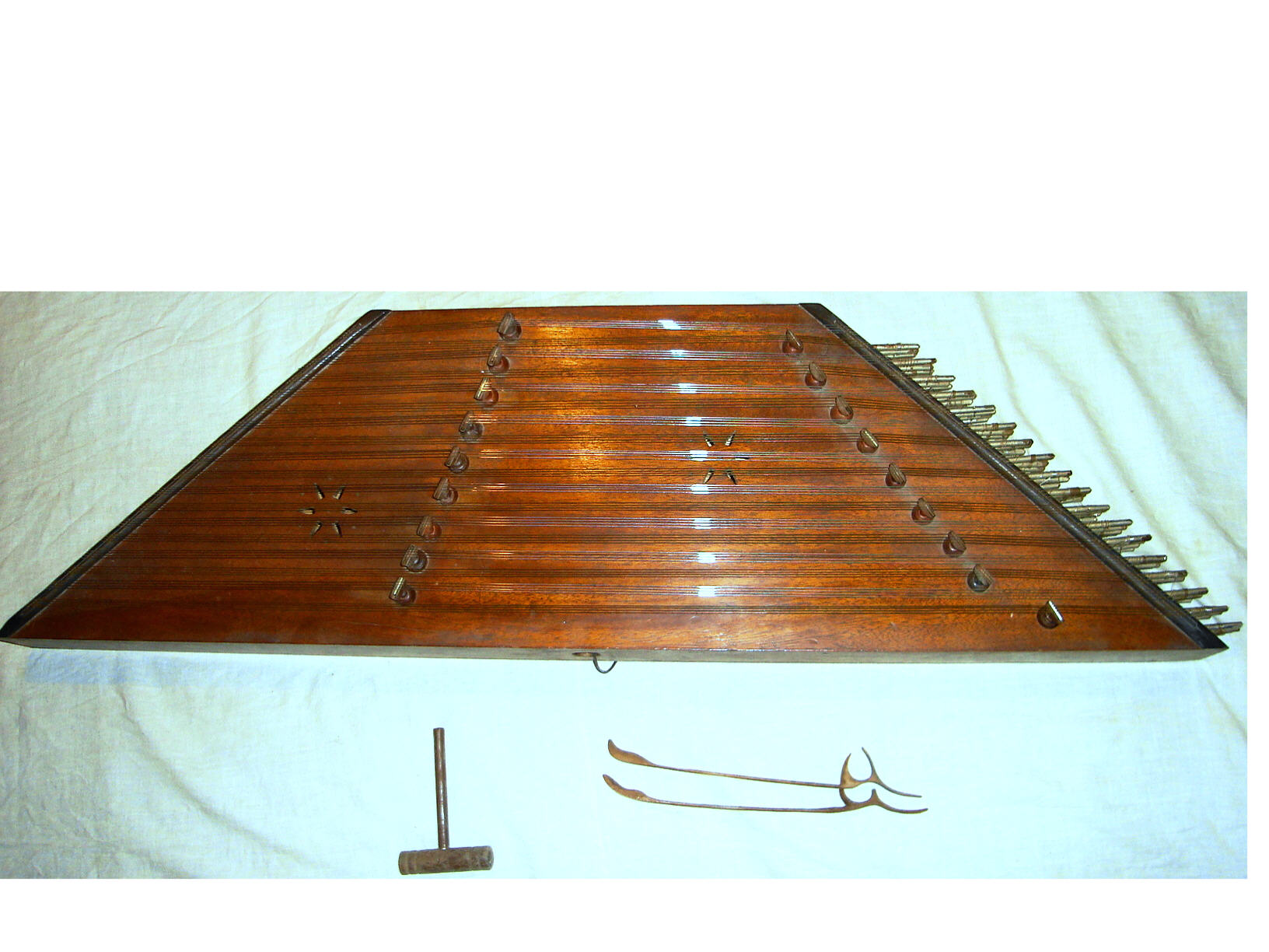 santur